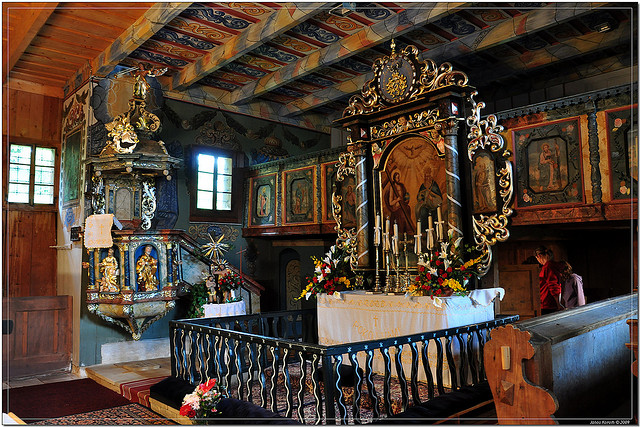 Altar